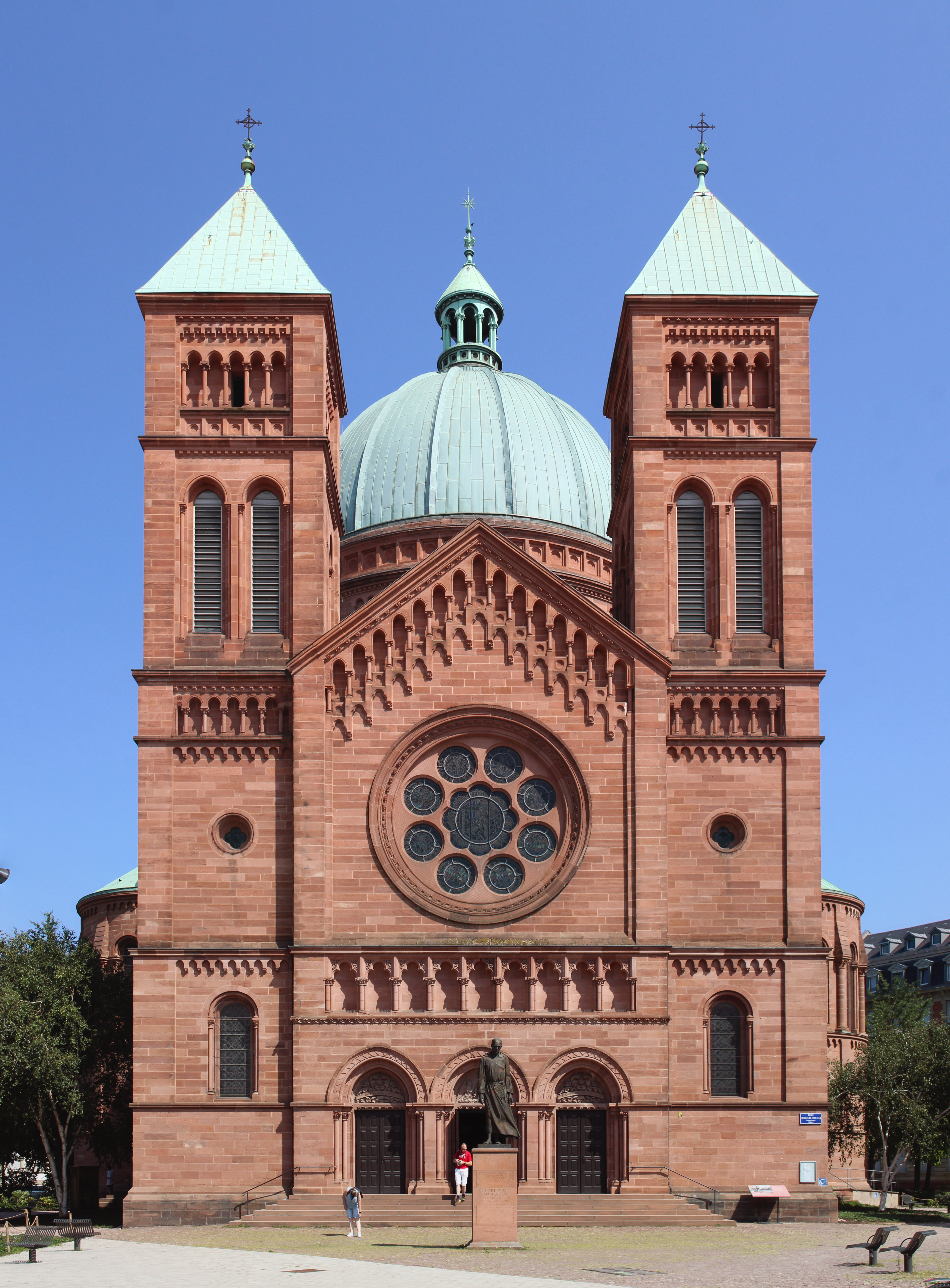 Extérieur de l'église Saint-Pierre-le-Jeune catholique de Strasbourg.